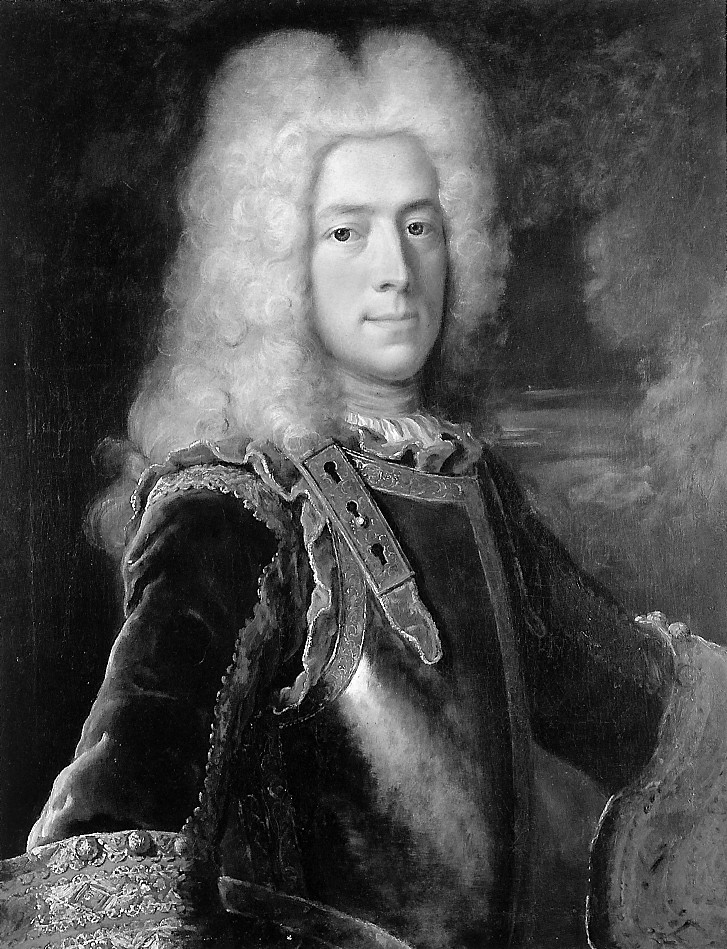 Porträt von Jacques-Barthélemy Micheli du Crest (1690-1766)